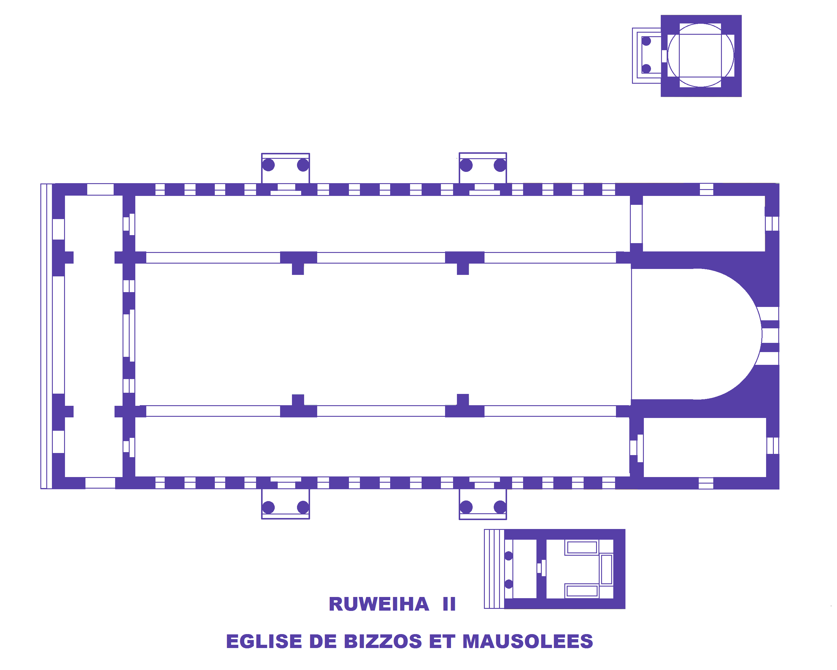 Ruweiha II, Syrie, Plan de l'église de Bizzos et mausolees